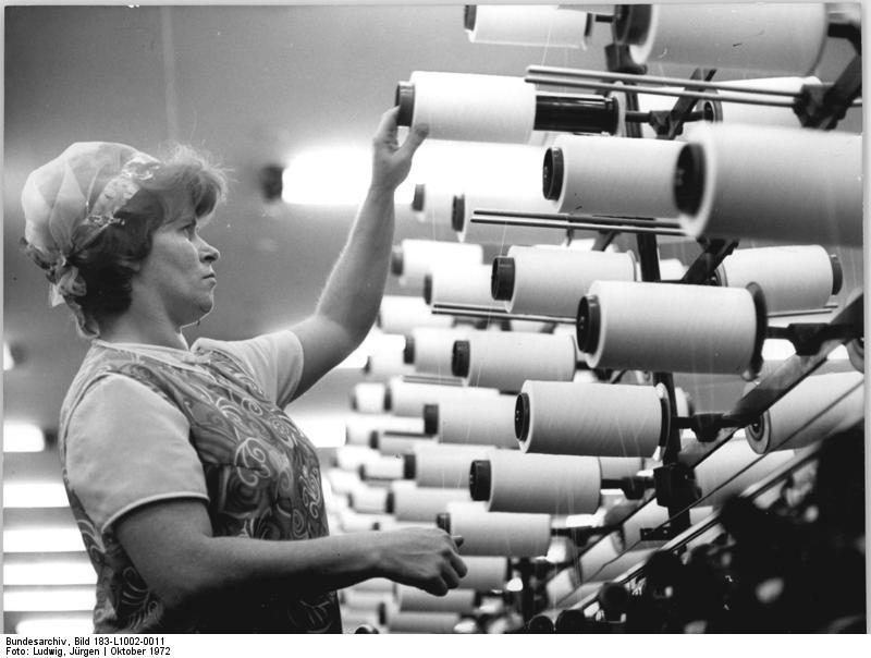 ADN-ZB-Ludwig-2.10.72-Bez. Erfurt: In der Baumwollspinnerei und -zwirnerei Leinefelde feiern die Werktätigen in diesen Tagen das 10jährige Bestehen ihres Betriebes. Ein "alter Hase" in diesem Betrieb ist die einstige Ringspinnerin Christa Bauer, die bereits seit 17 Jahren im Fach ist und vor sieben Jahren in das Eichsfeld kam. Hier hat sie ein neues zuhause in der jüngsten Stadt des Bezirkes Erfurt gefunden. In der Texturzwirnerei gehört sie zu den bewährten Fachkräften. Wiederholt konnte die für ihre Qualitätsarbeit ausgezeichnet werden.